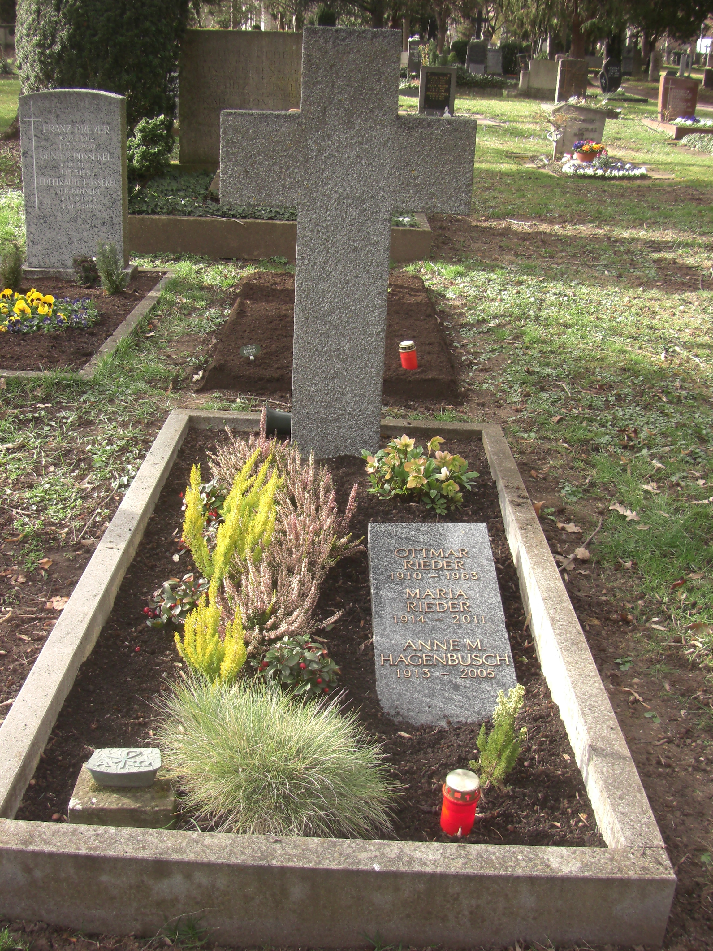 Grabstätte von Frau Anna Hagenbusch